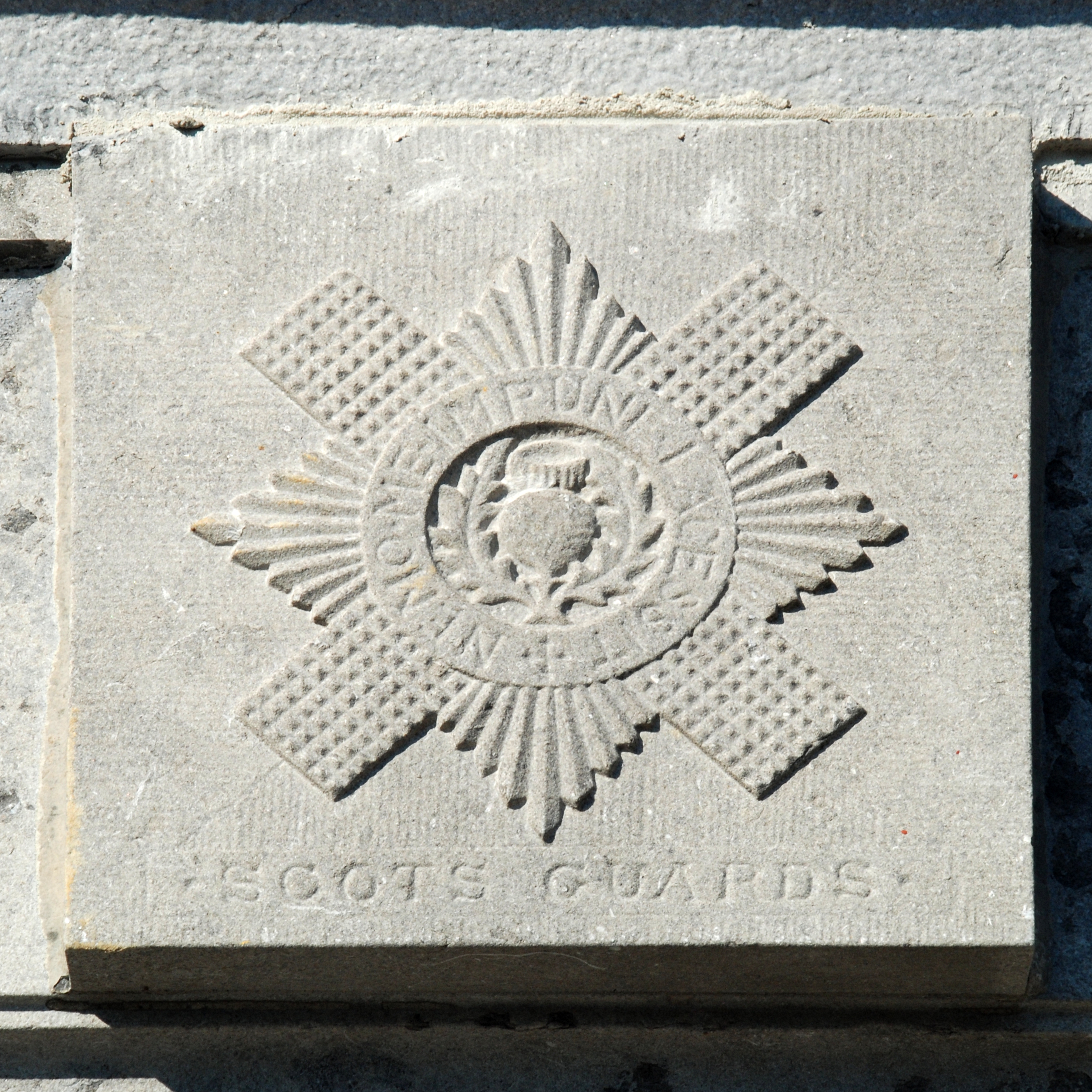 Belgique - Brabant wallon - Bataille de Waterloo - Monument Gordon